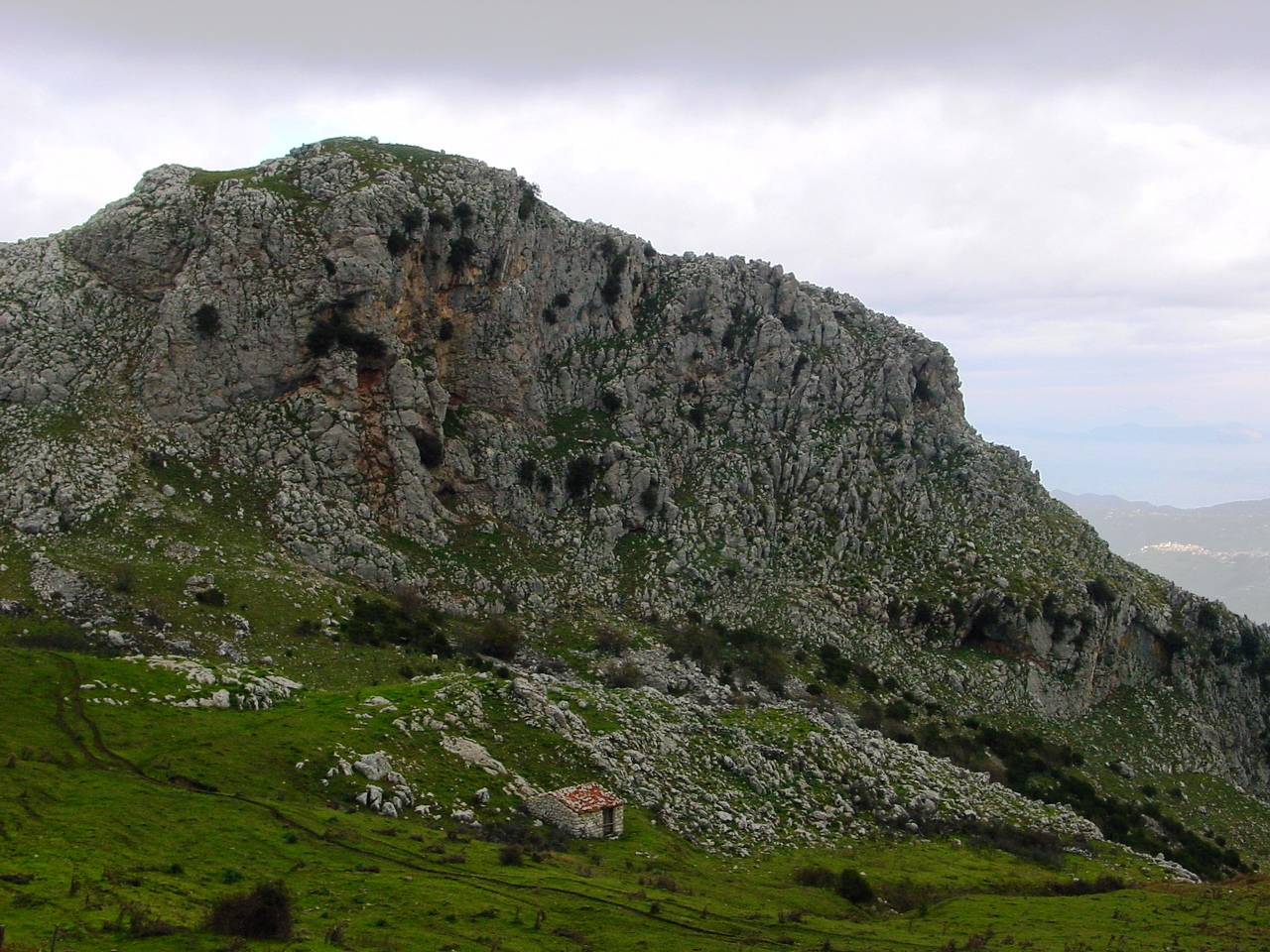 Parco dei Nebrodi, Sicily Rocche del Crasto